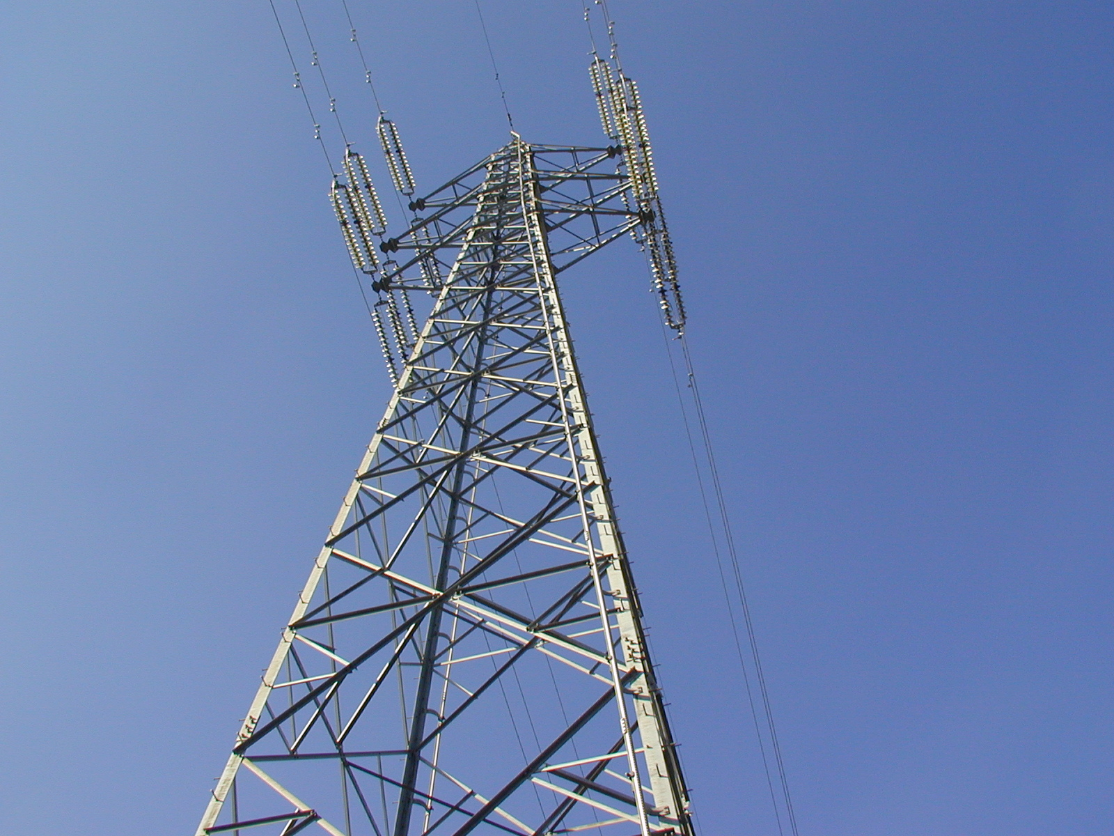 鉄塔 Description: A Steel tower Place: Mutsumi Sakura-dori(Cherry tree Street), Matsudo, Chiba, Japan Source: Photograph taken by 高橋 宗史 Date: December, 2005 Author: 高橋 宗史 Permission: GFDL, cc-by-sa-2.5,2.0,1.0, cc-by-sa-2.1-jp Other versions of this file